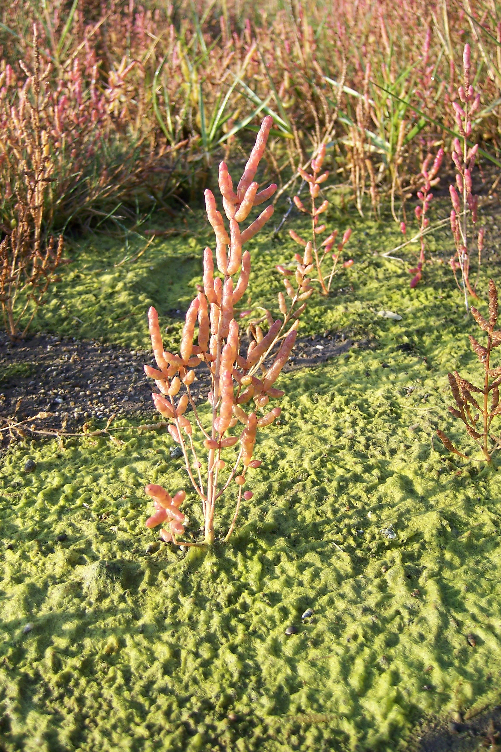 Nordseeinsel Spiekeroog: Queller (Salicornia europaea)